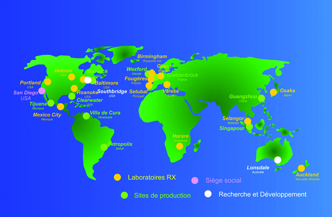 SOLA manufacturing and logistic worldsites in 2004